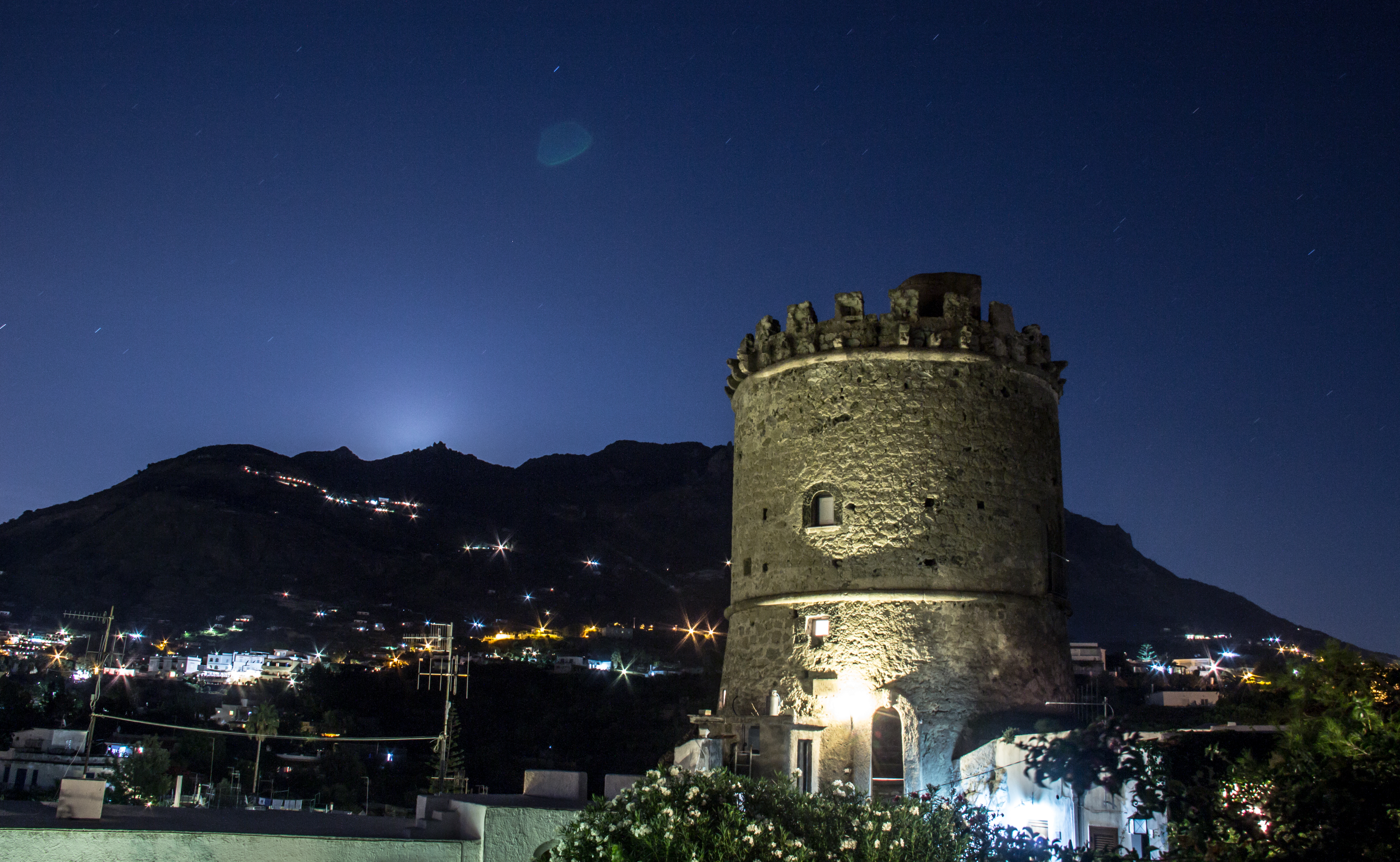 Foto della torre Torone di notte